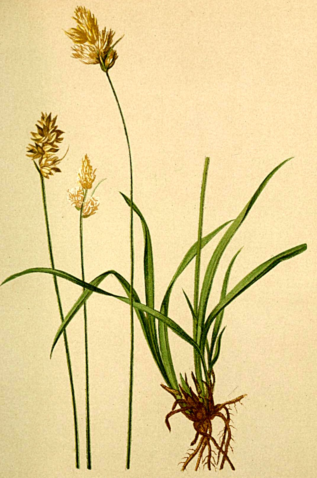 Carex leporina (Carex lachenalii)